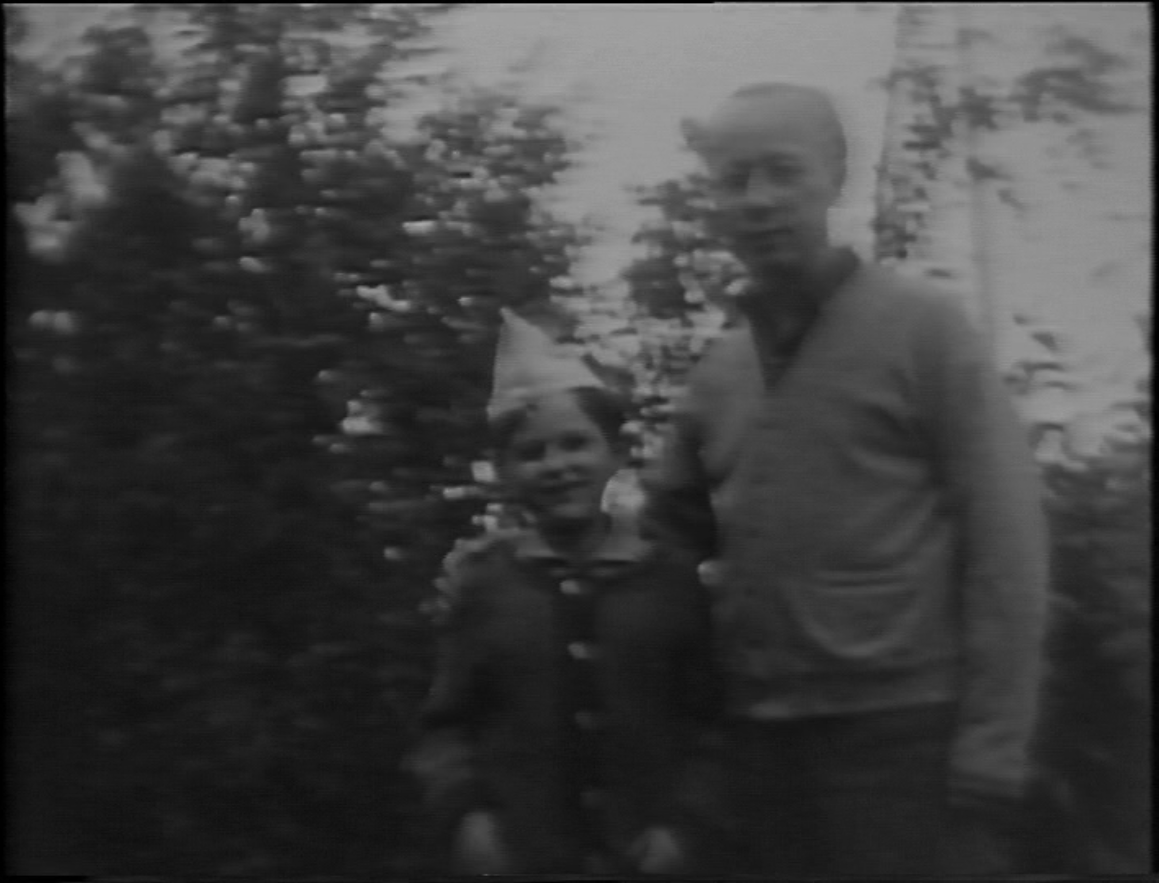 Илья Заславский в детстве (с отцом)